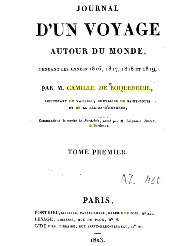 Tome premier / 2 tomes 1823